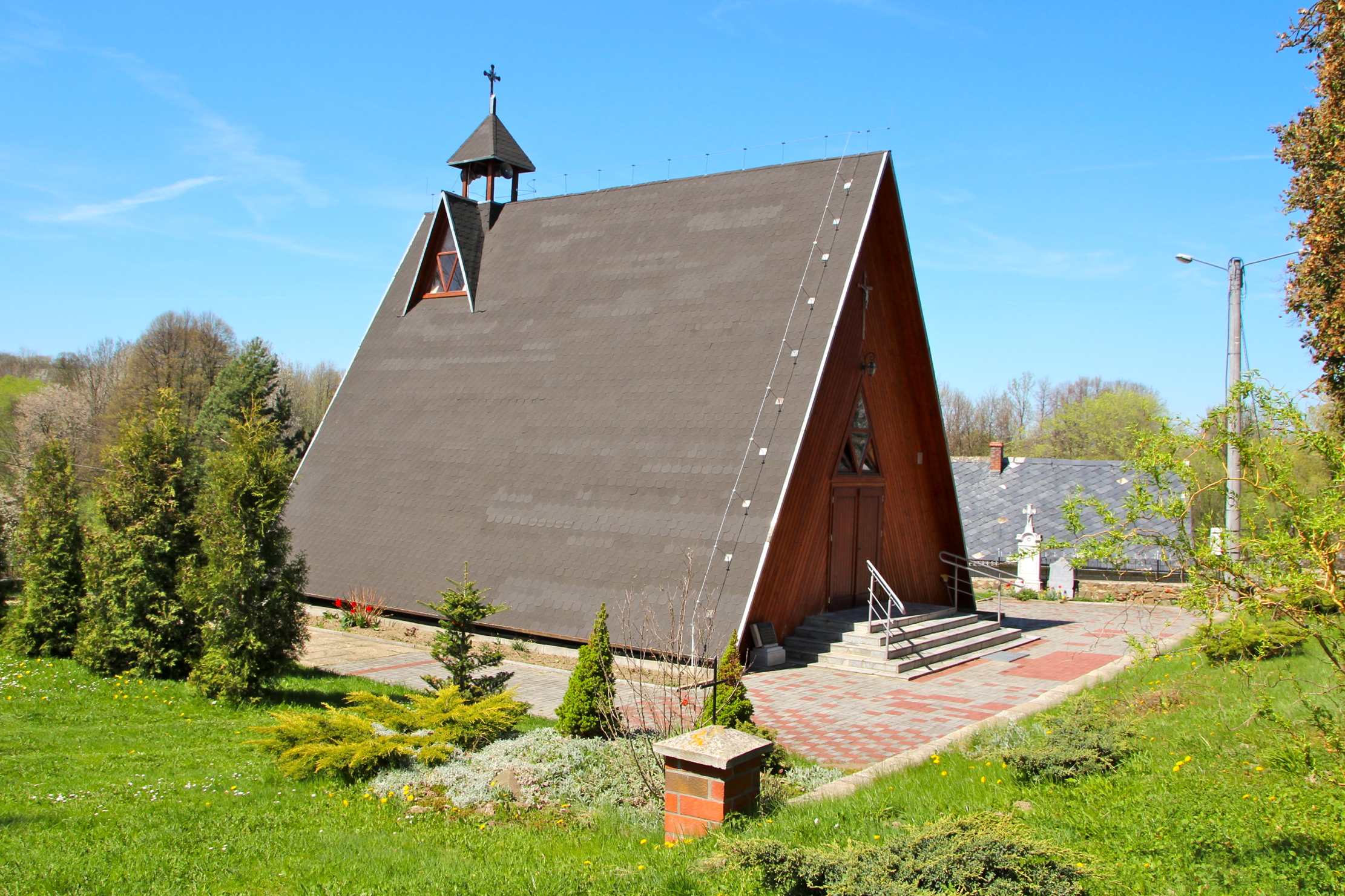 Pielgrzymów - wieś w Polsce położona w województwie opolskim, w powiecie głubczyckim, w gminie Głubczyce.